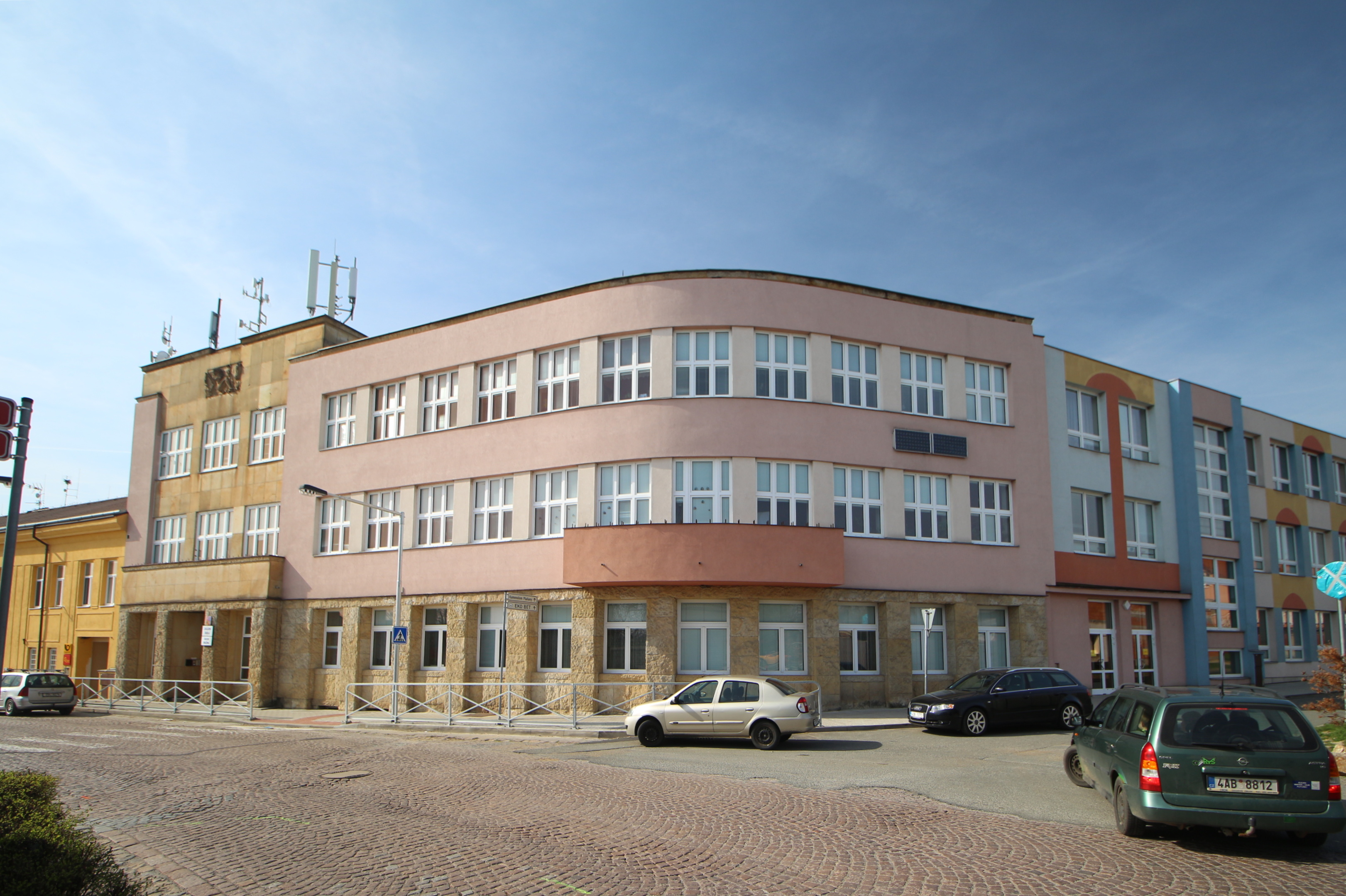 Plaňany, škola, Pražská čp. 28.